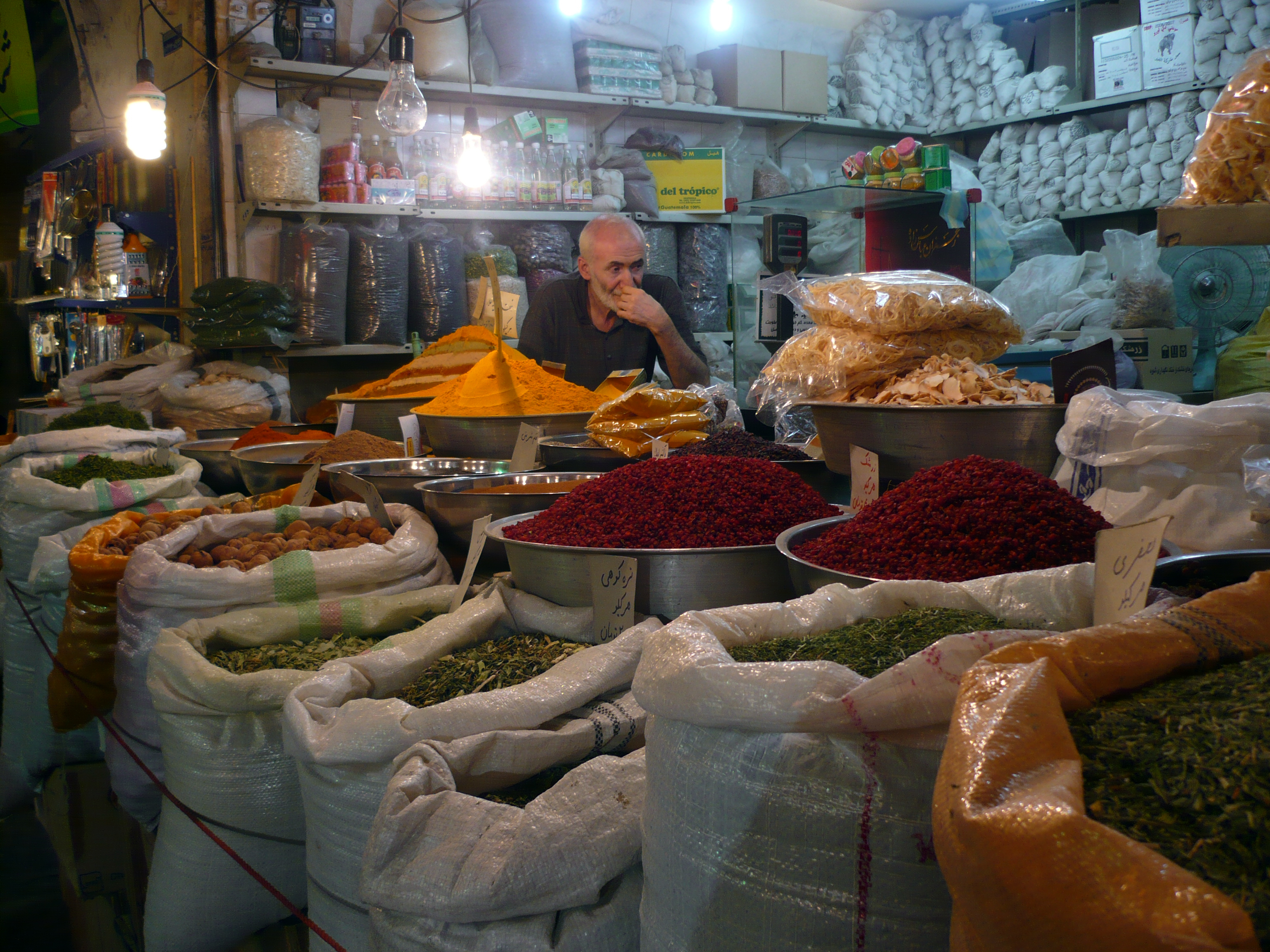 Bazar di Esfahan, venditore di spezie. La fotografia può rendere i colori e le situazioni, ma purtroppo, all'osservatore che non si recherà di persona in questo luogo, non renderà mai il profumo delle spezie.